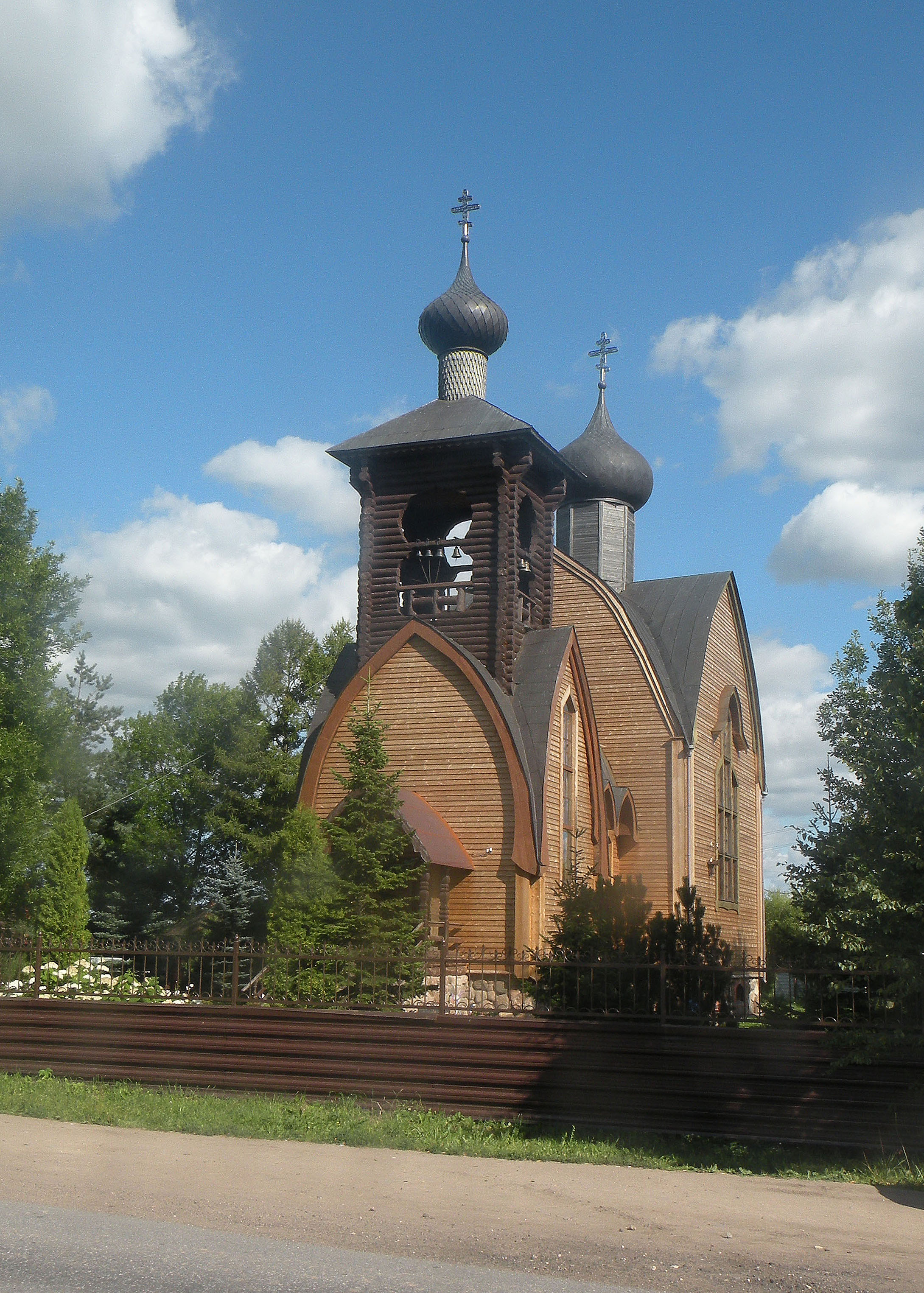 Церковь Вознесения Христова